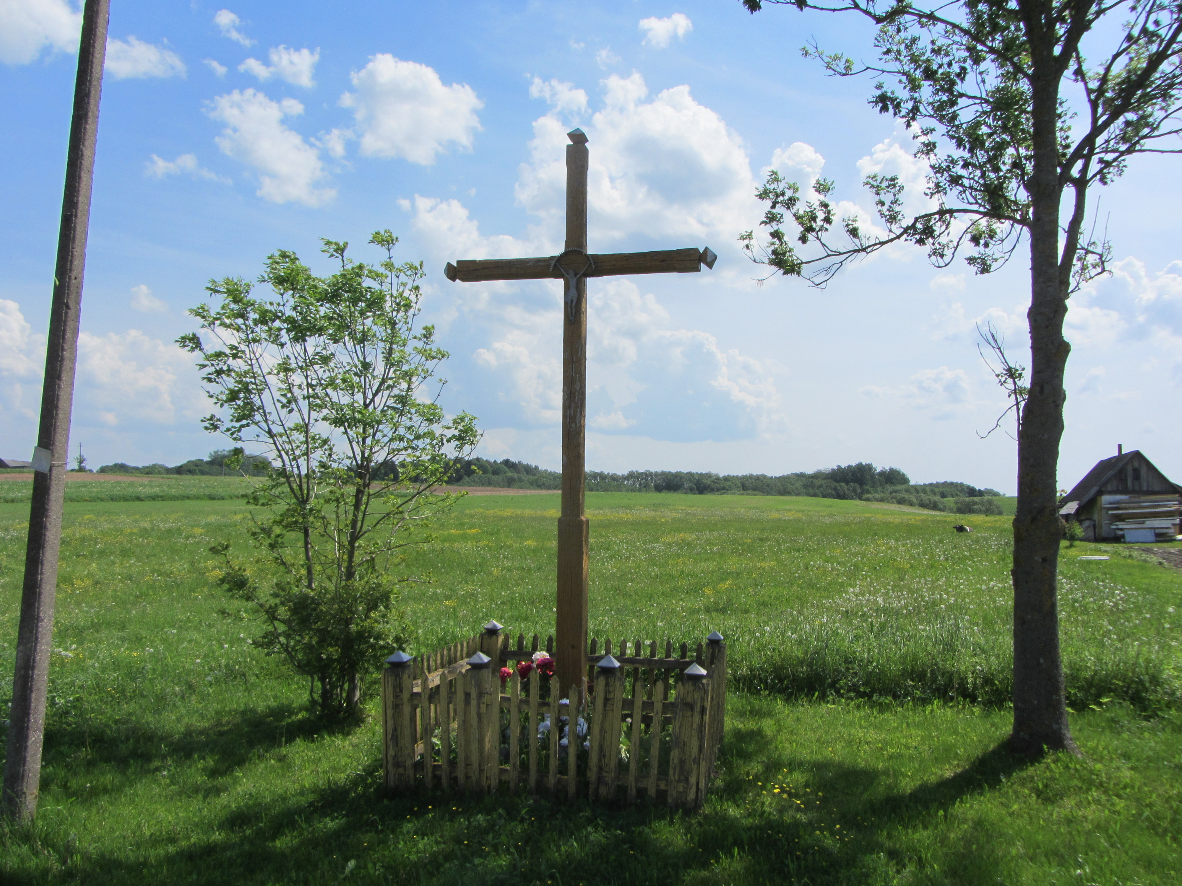 Miežionys 14230, Lithuania